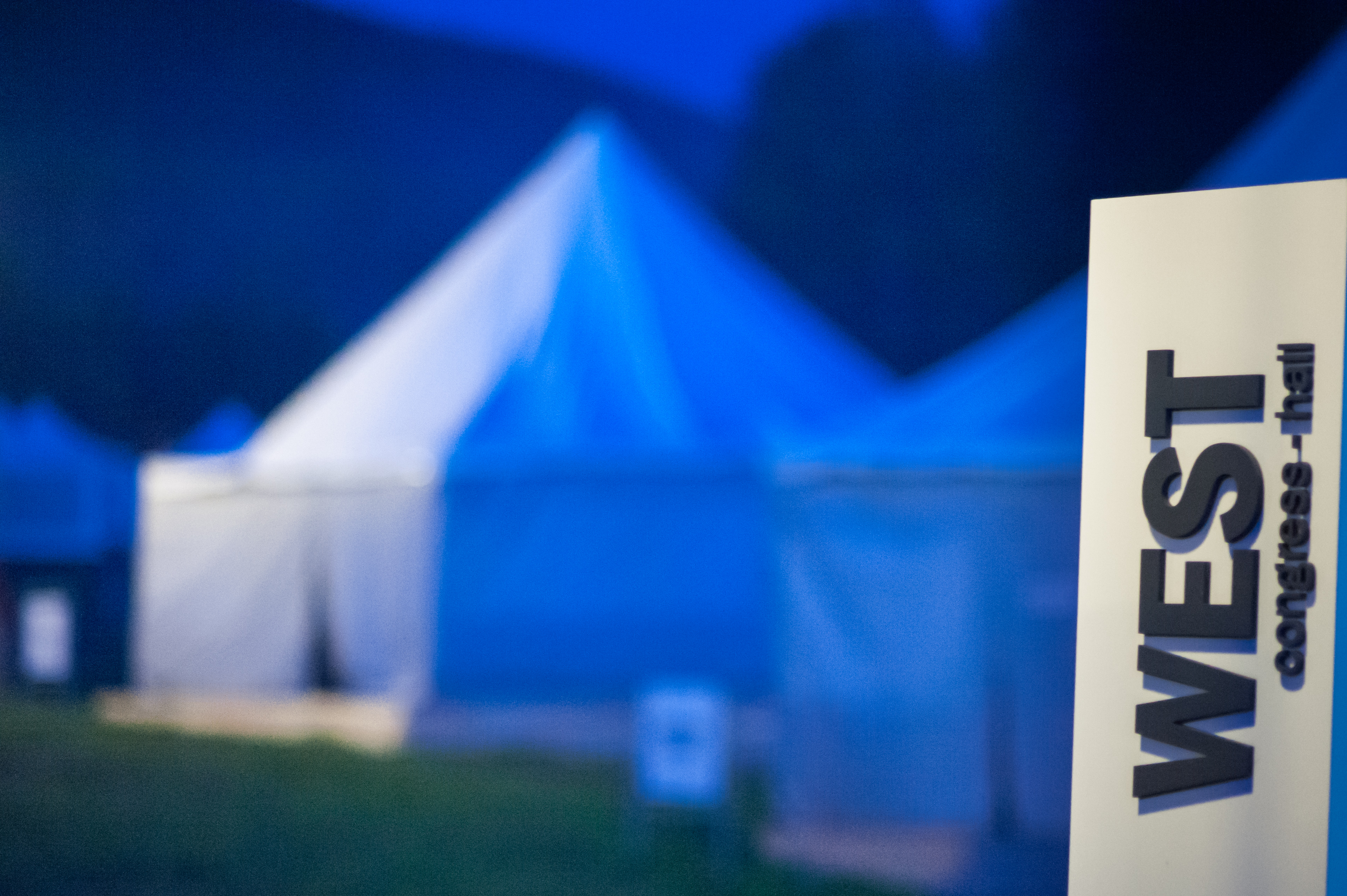 Указатель около конгресс-холла Запад